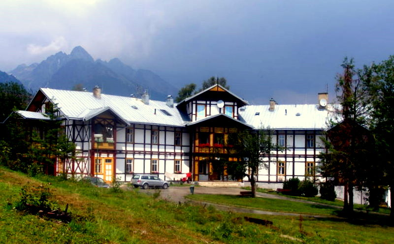 Vila Šafárik,osada Dolný Smokovec mesto Vysoké Tatry.